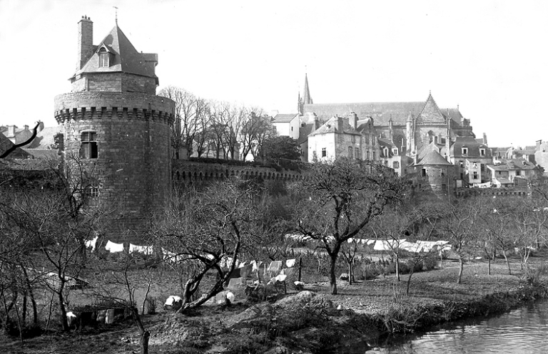 Carte postale ancienne 1900, remparts de Vannes